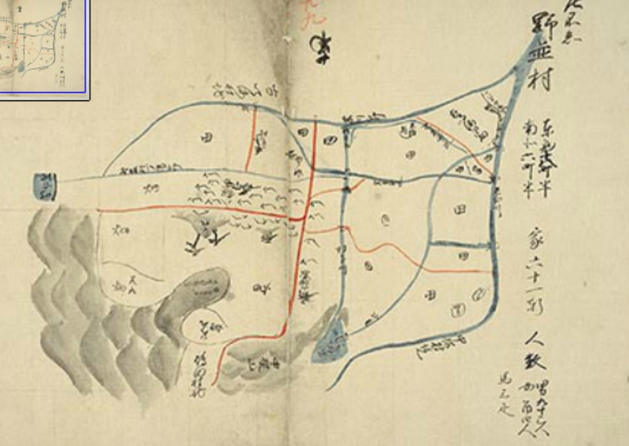 野並村